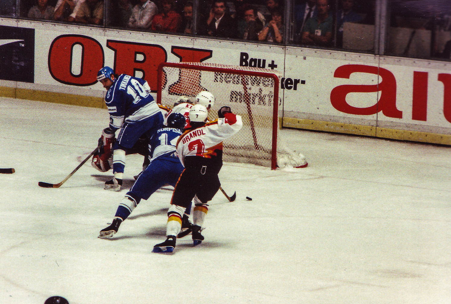 Spielszene aus der Begegnung Deutschland - Finnland am 23. April (3:1)